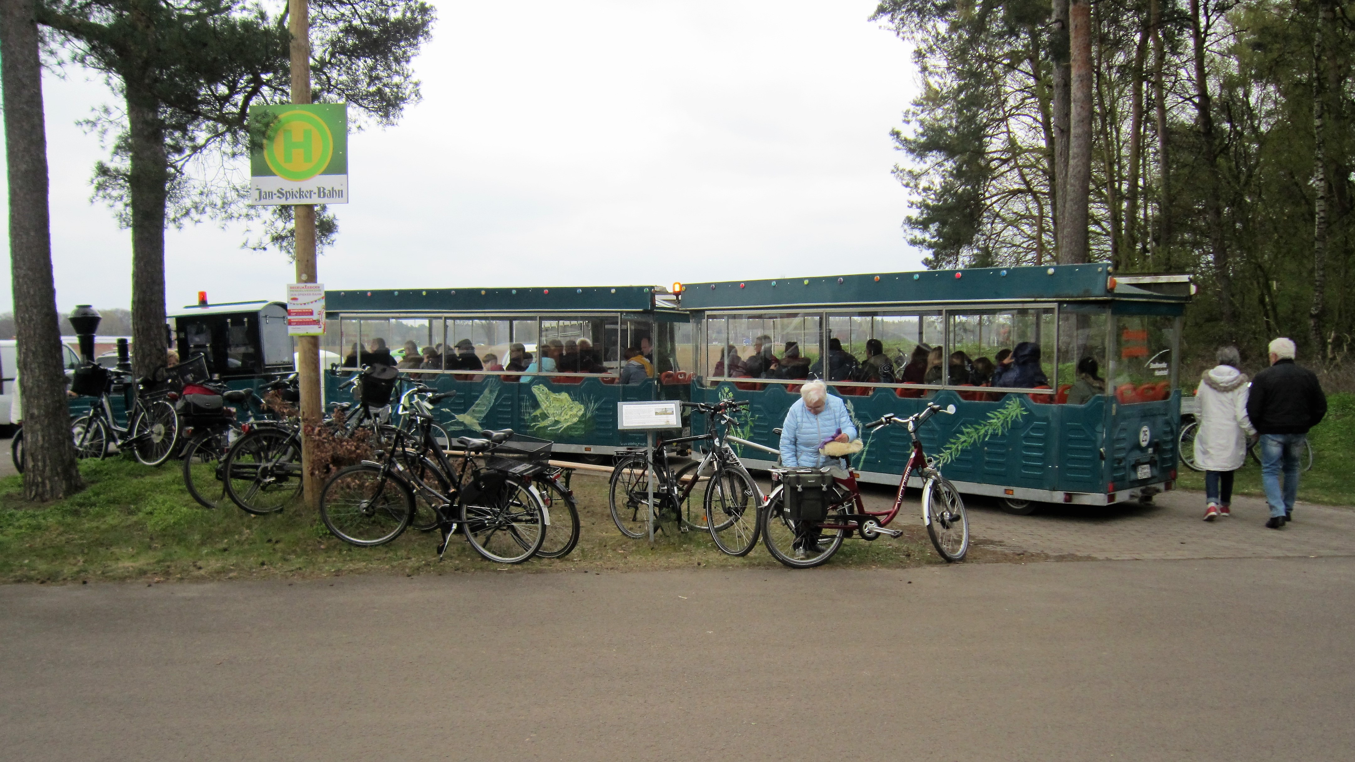 Bimmelbahn Jan Harpstedt an der Haltestelle Barnstorfer Umwelt- und Erlebniszentrum bei Barnstorf